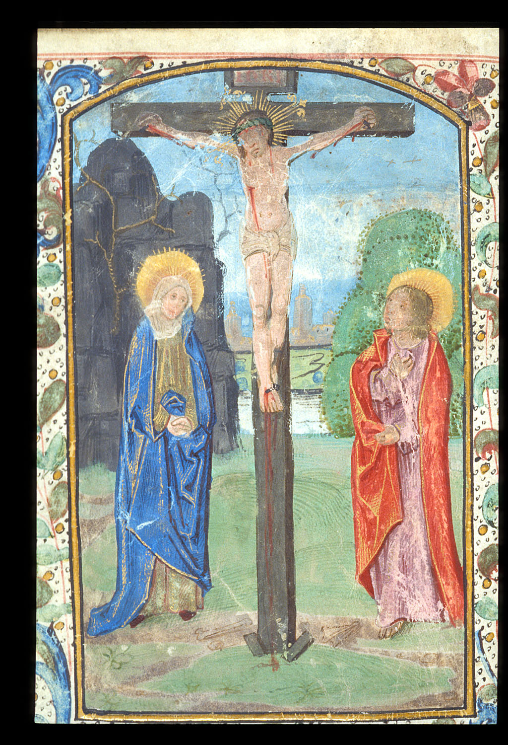 Kruisiging uit een getijdenboek gemaakt in Doornik omstreeks 1480, nu bewaard als Harley 2923